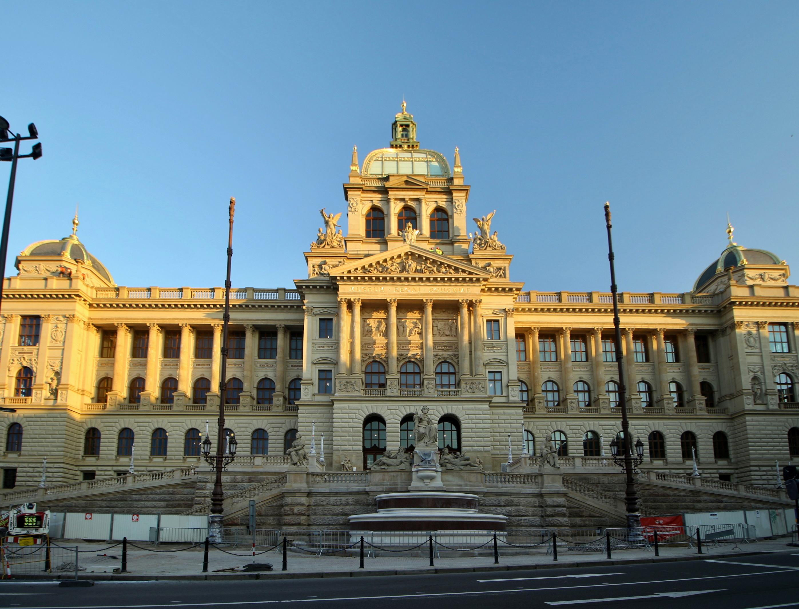 Národní muzeum v Praze